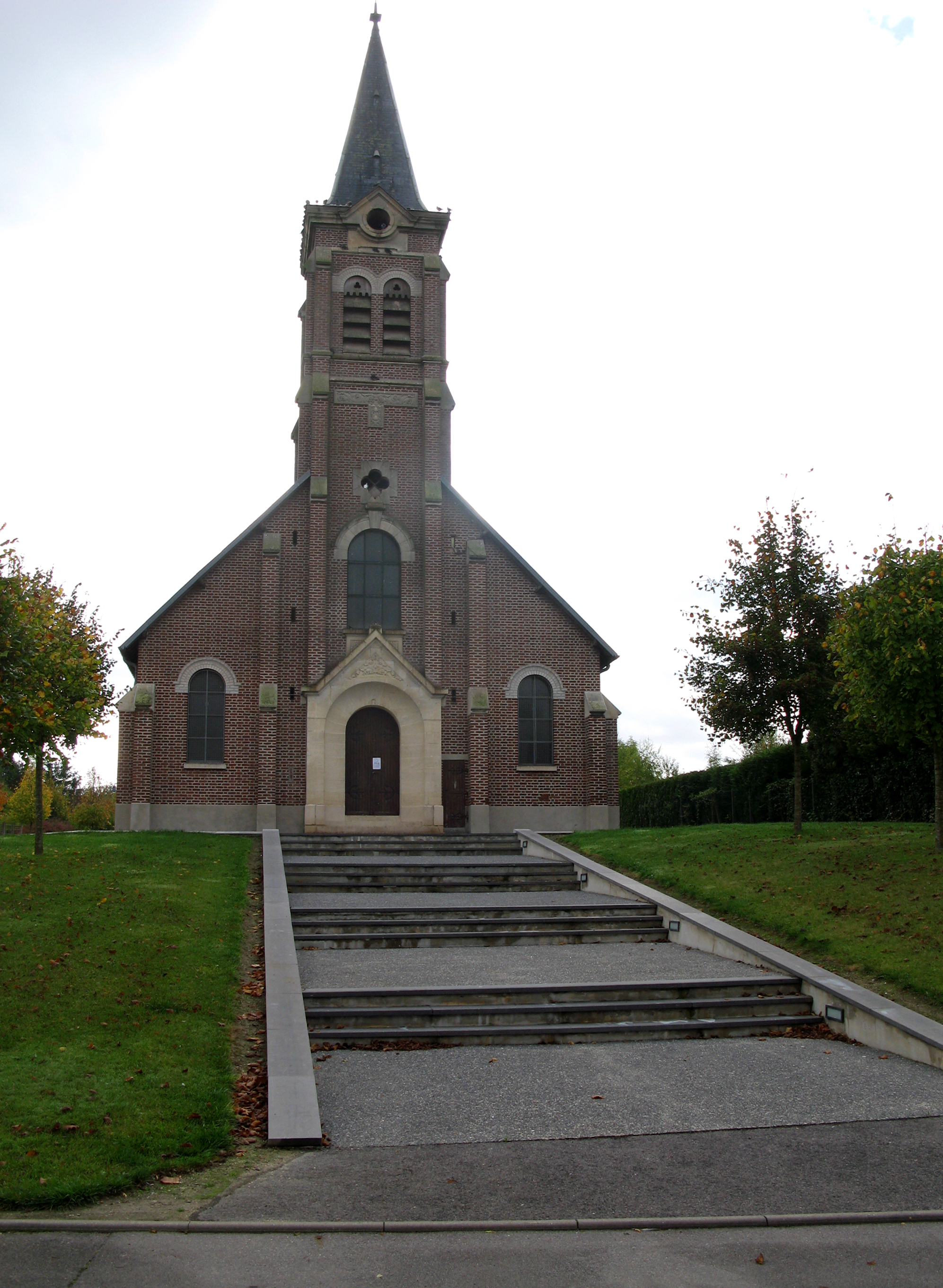 Pontruet (Aisne, France) - L'église. L'accès à l'édifice a récemment été réaménagé (4 paliers de 3 marches chacun). .